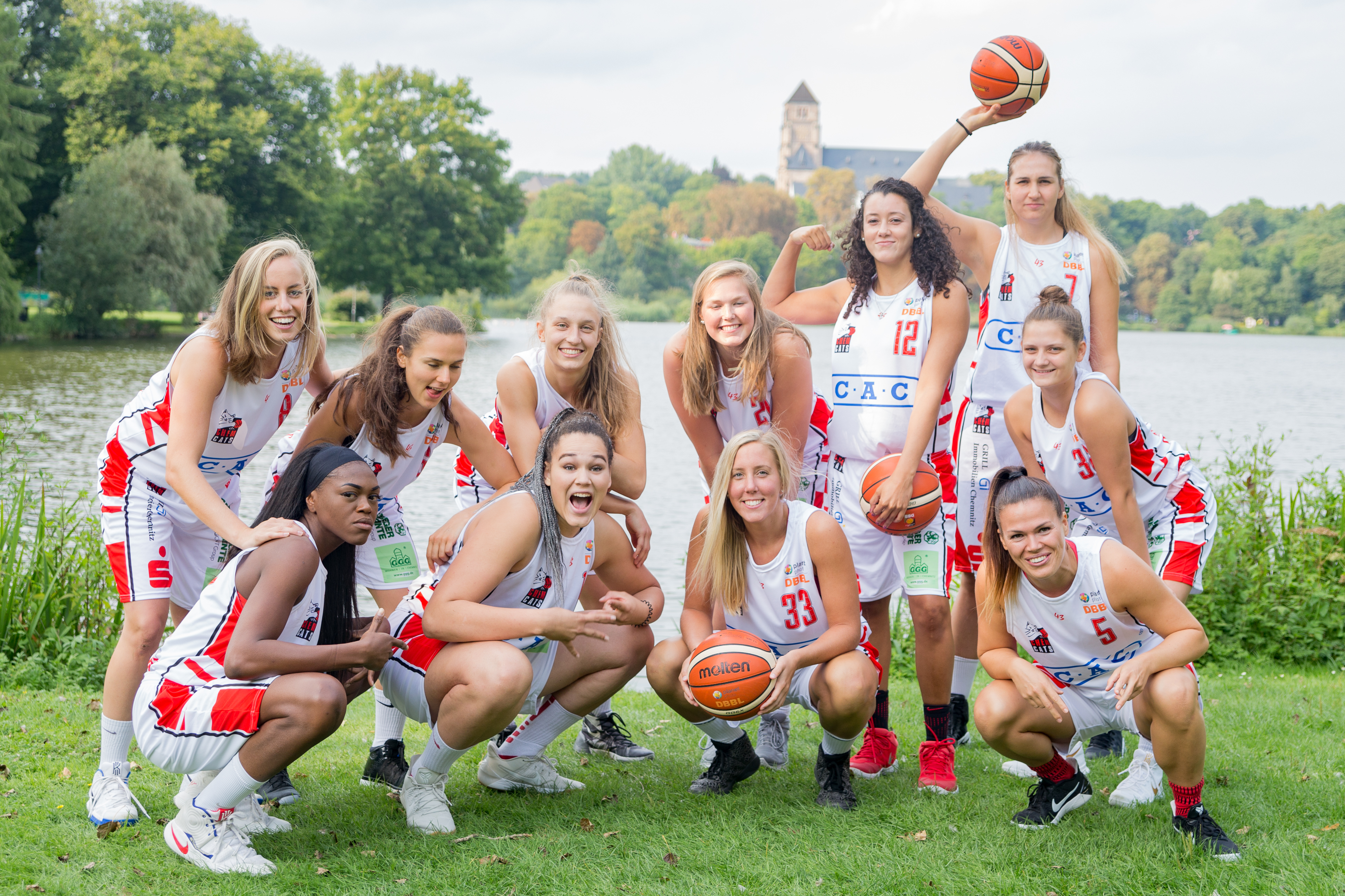 Basketball, 1. Damen-Basketball-Bundesliga, ChemCats Chemnitz; Mannschaftsfoto ChemCats Chemnitz; obere Reihe: Jacobine Klerx (8), Margot Vidal-Geneve (6), Lucile Peroche (11), Clarissa Ober (21), Kendall Noble (12), Jovana Mandic (7); untere Reihe: Abigail Asoro (9), Elea Gaba (17), Valerie McQuade (33), Katarina Flasarova (5), Rebekka Kalaydjiev (32)